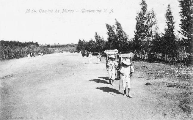 Campesinos artesanos de la Villa de Mixco en 1910, aproximadamente.